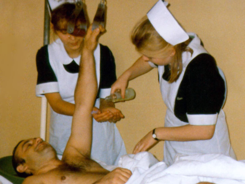 Liceum Medyczne w Chełmie, 1993